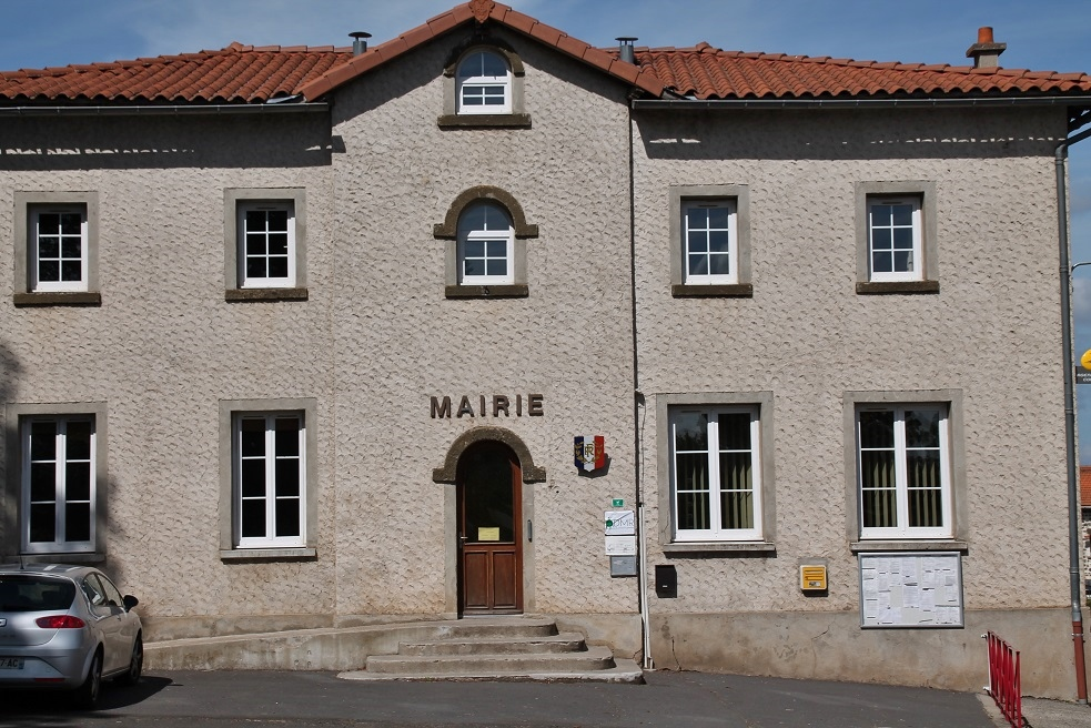 la Mairie